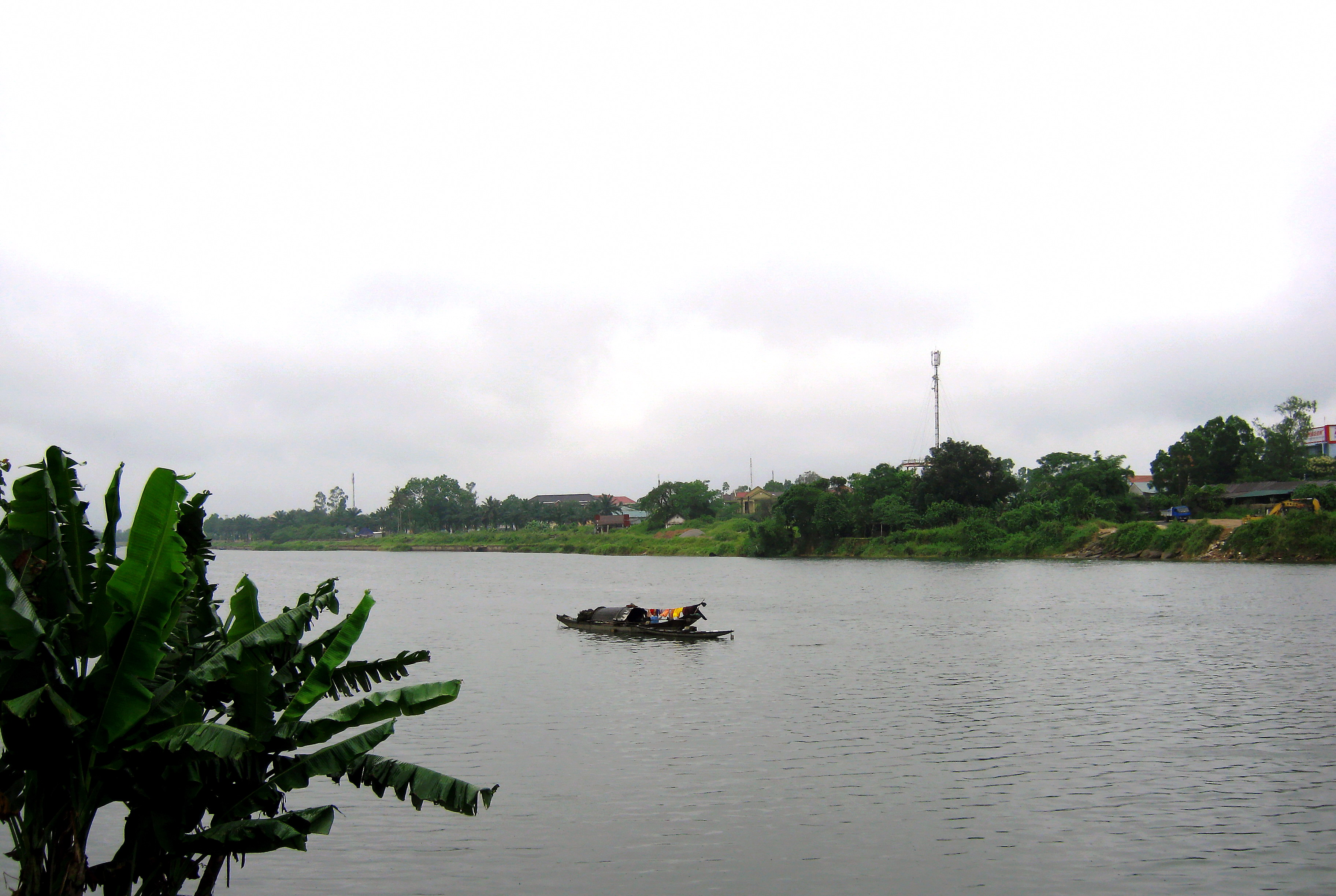 Sông Hiếu, đoạn chảy qua chợ Đông Hà (Quảng Trị, Việt Nam).